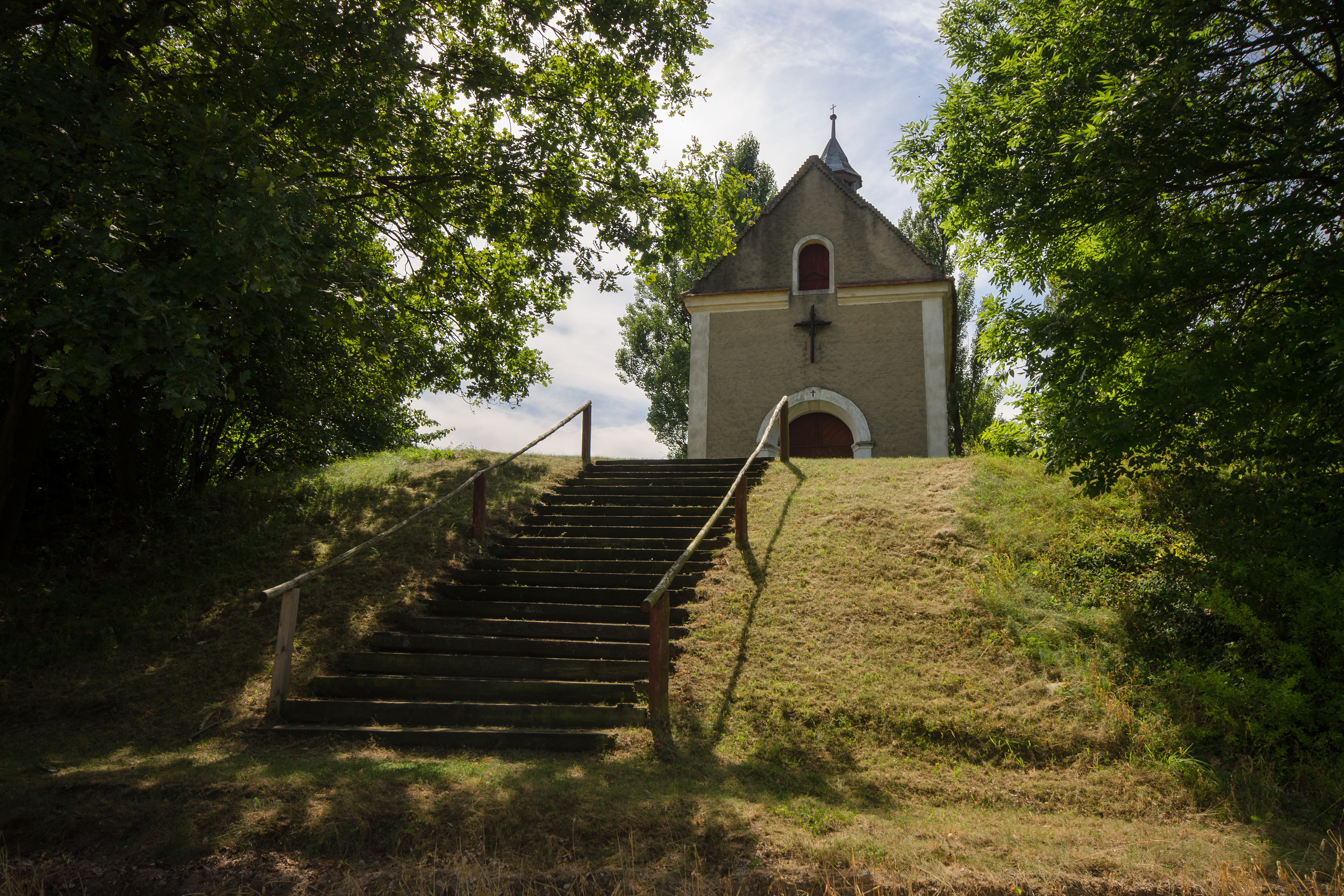 Trzcinica Wołowska, kaplica pomocnicza p.w. Matki Boskiej Bolesnej 02.2013.